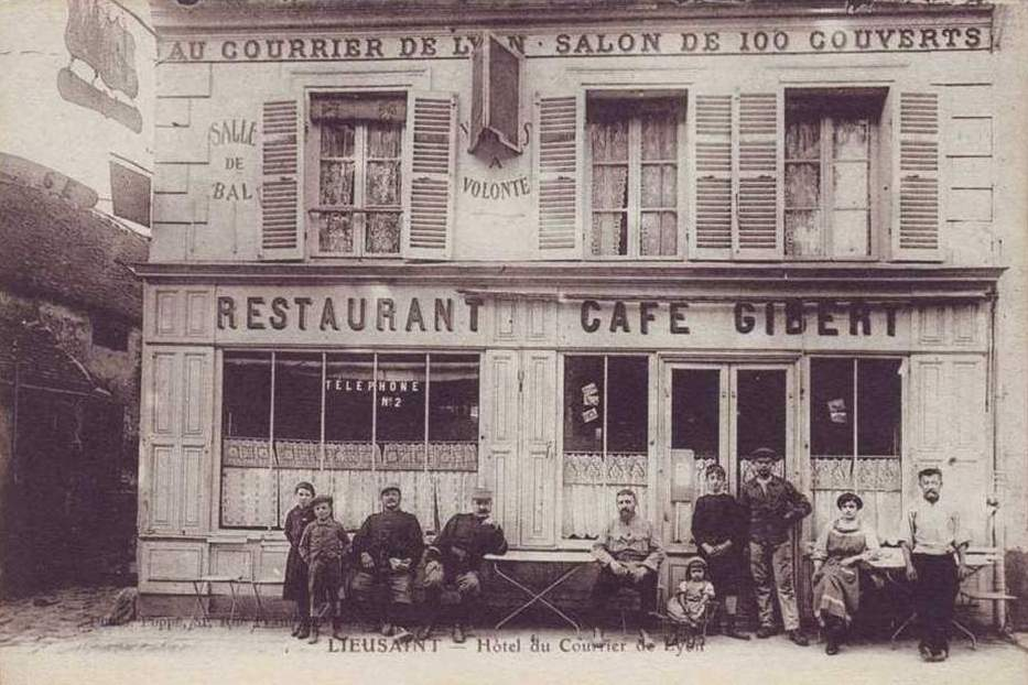 Carte postale ancienne montrant l'ancien relais de poste de Lieusaint (Seine-et-Marne, France), devenu par la suite le restaurant-café Gibert, 73 rue de Paris.